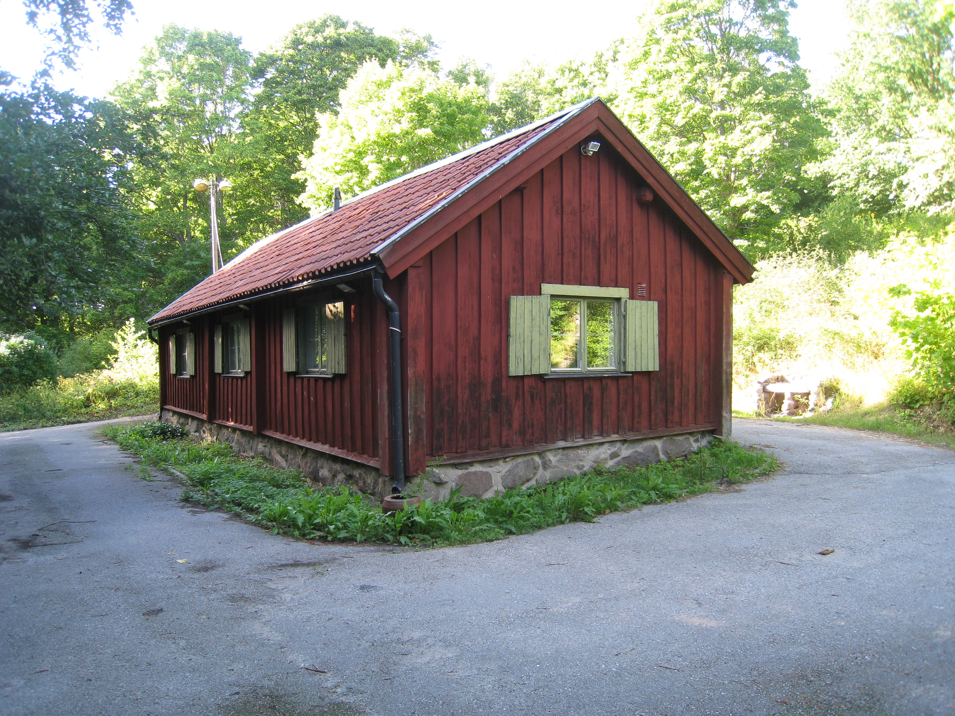 Karsviks Östergård i Norra Ängby, Bromma. Karsviks Östergård är en knuttimrad parstuga av nordländsk typ och består av förstuga, kammare, vardagsstuga (kök) och herrstuga (sal). Stugan antas vara byggd på 1600-talet och ligger i Karsviks hage vid Tegnebyvägen i Norra Ängby.